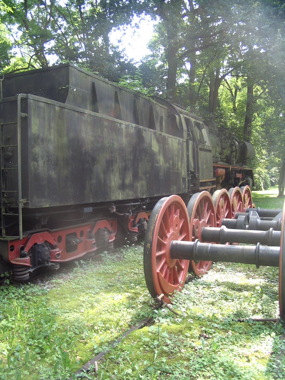 BR50 im Bahnhof Linde